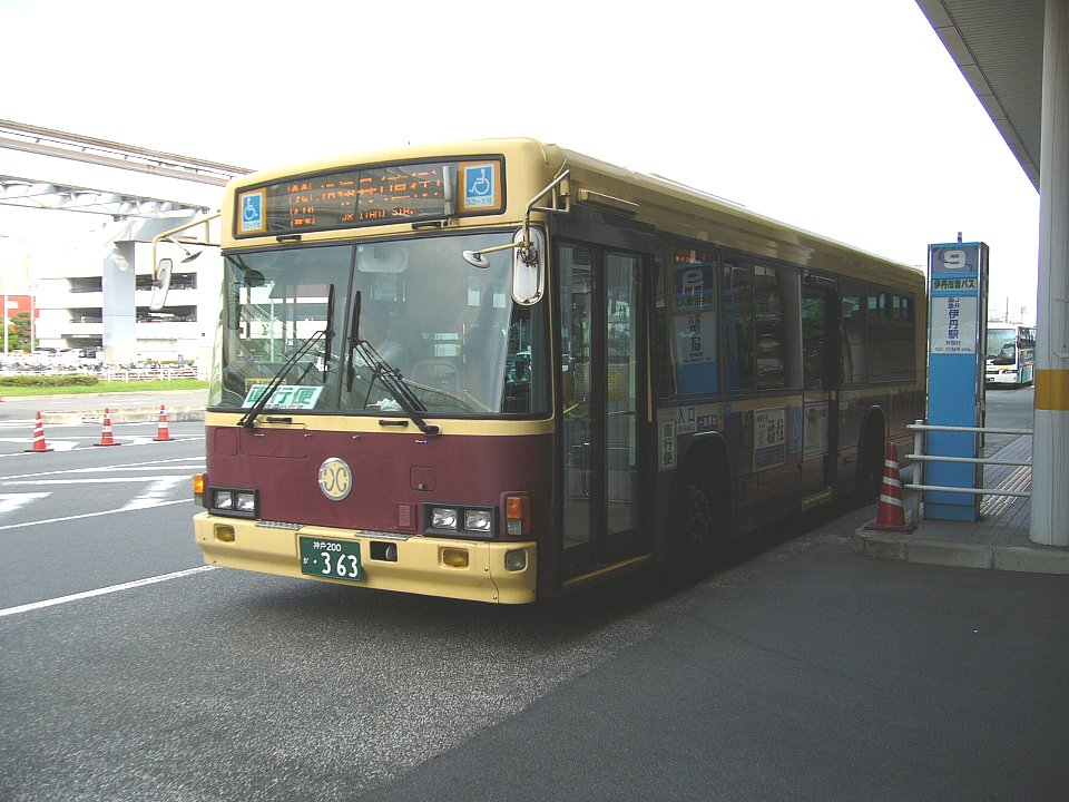 伊丹市営バス 50周年記念塗色「プリンバス」 大阪国際空港（大阪府豊中市）にて